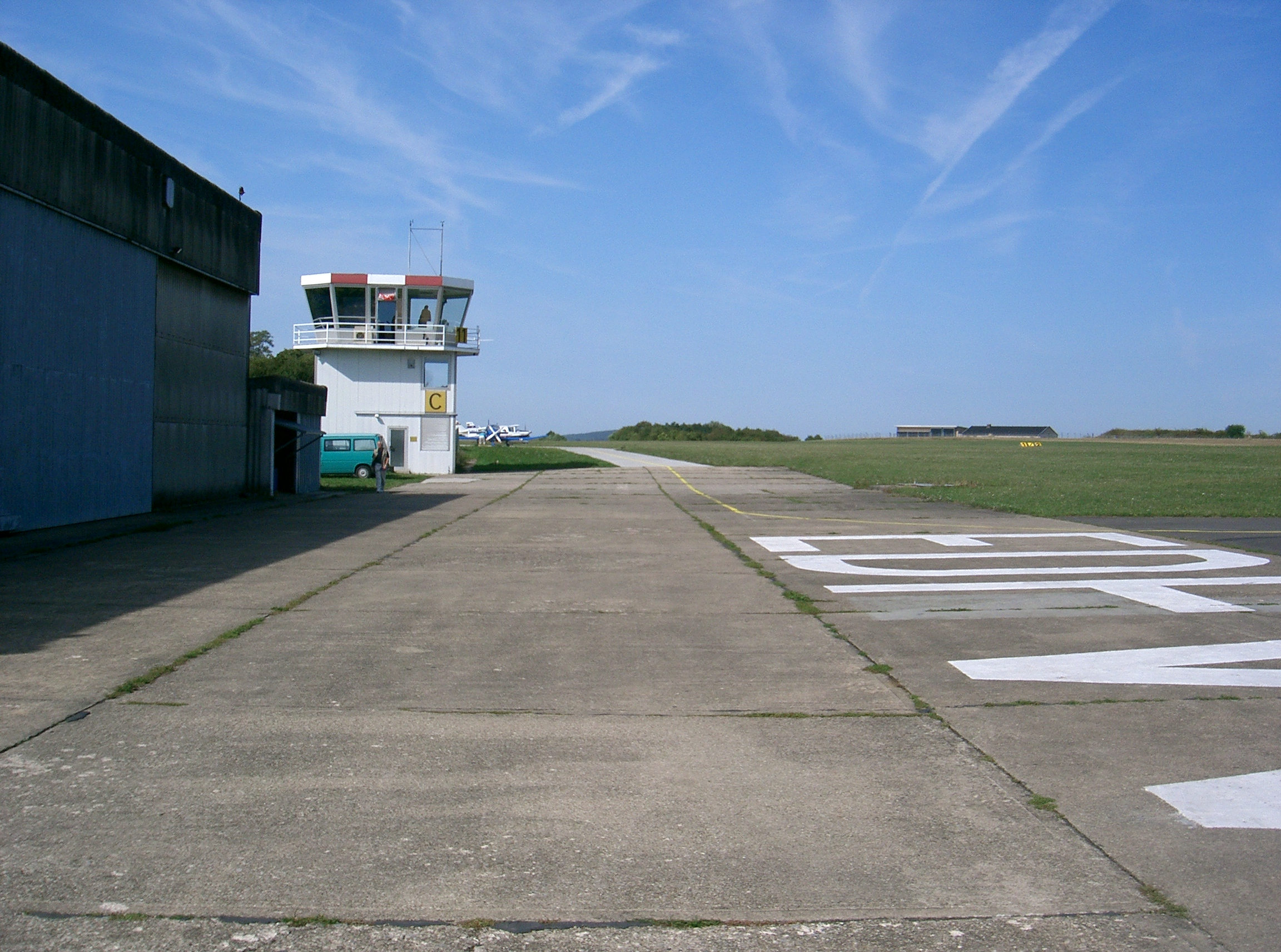 Tower am Flugplatz Schenkenturm, Blick von Osten, 10. Sep. 2006